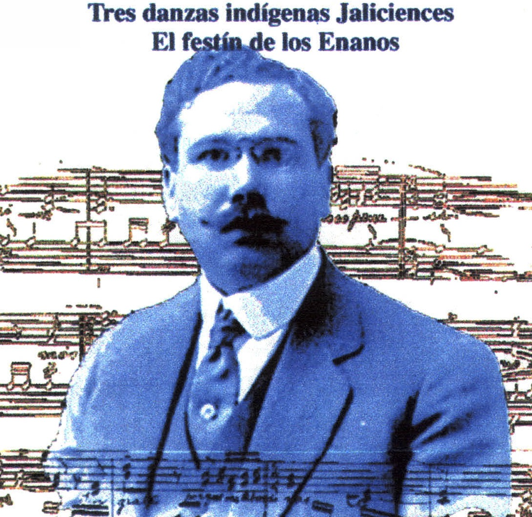 JOSE ROLON FOTO